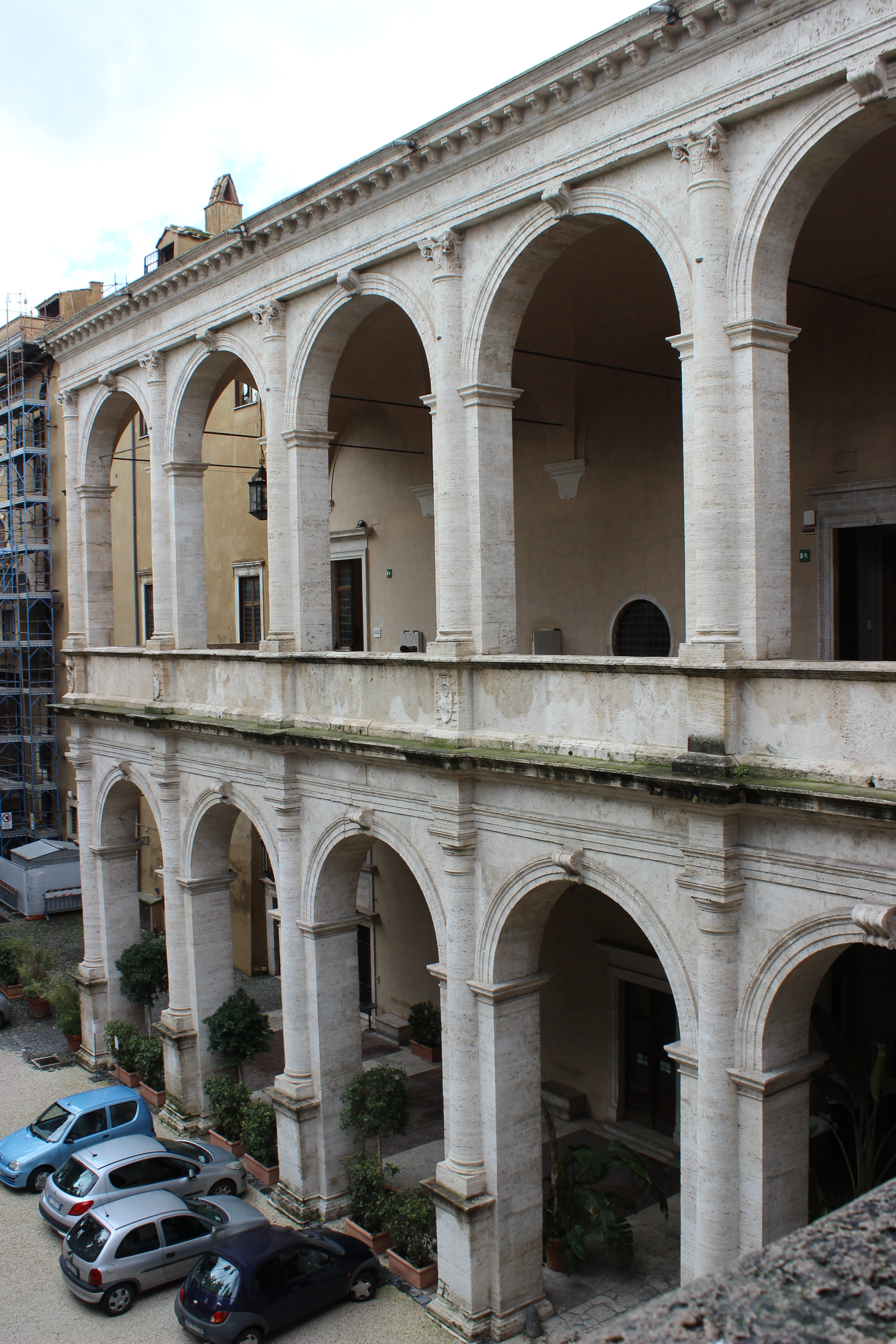 Roma. Palazzo Venezia, Loggia.